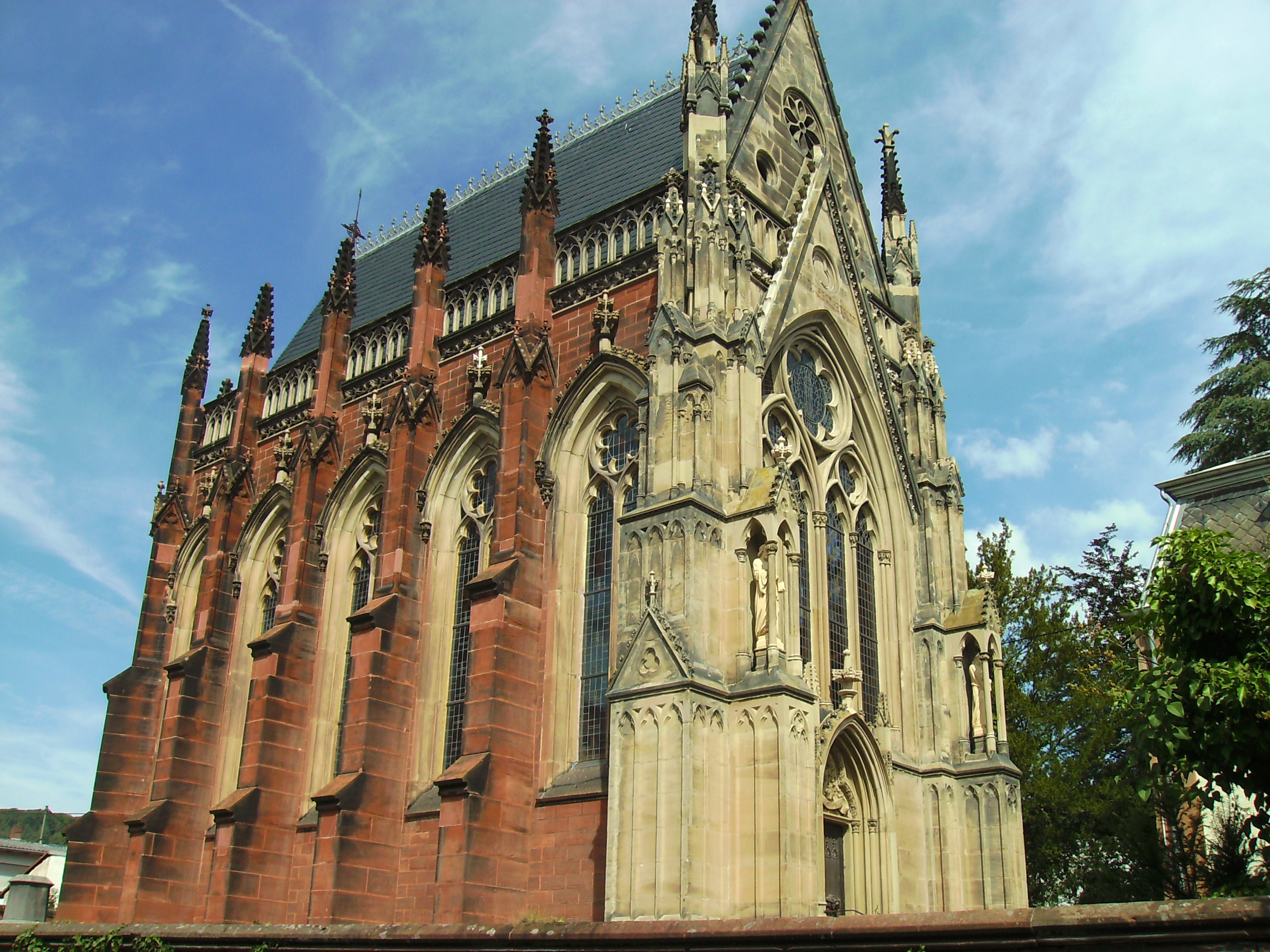 Kapelle St. Joseph in Mettlach: Front-Ansicht